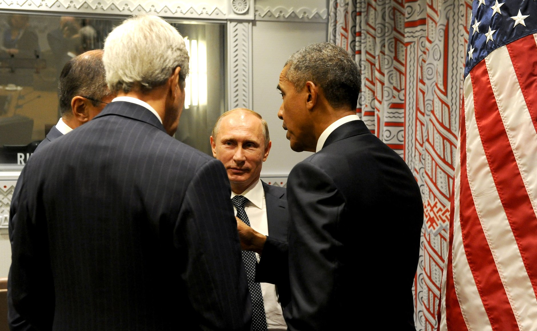 По окончании встречи с Президентом США Бараком Обамой